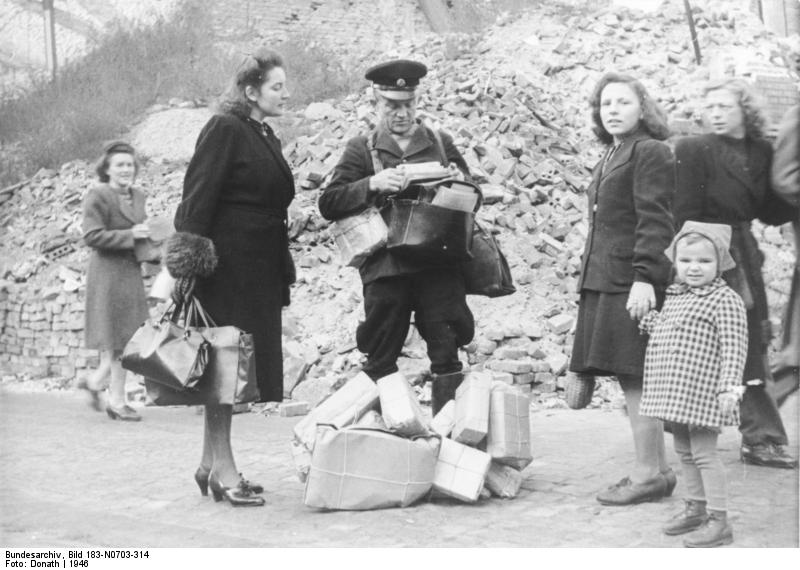 ADN-ZB/Donath Berlin 1946 Aus der Nachkriegszeit Briefe und Päckchen werden wieder durch den Briefträger zugestellt.